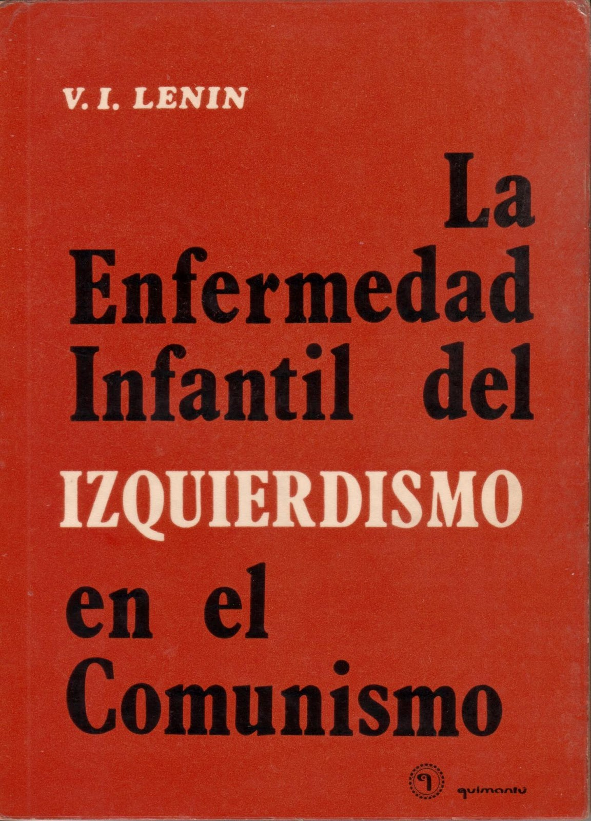 Edición chilena, publicada por la editorial Quimantú (1972) - Colección clásicos del pensamiento social.